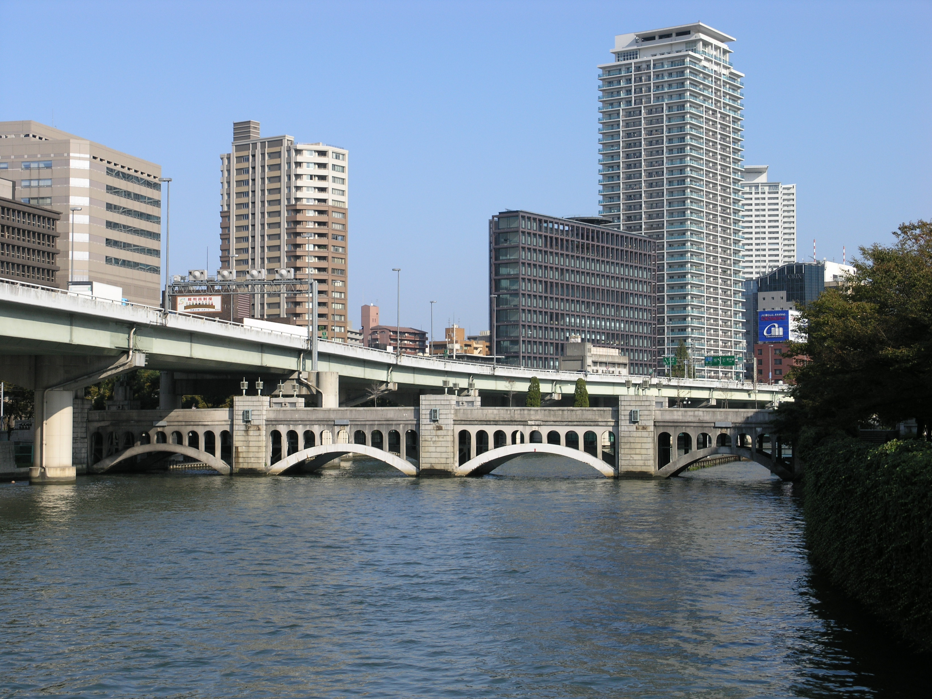 水晶橋（大阪市北区） 2008年10月撮影。 機材：C8080WZ 撮影者：Kansai explorer